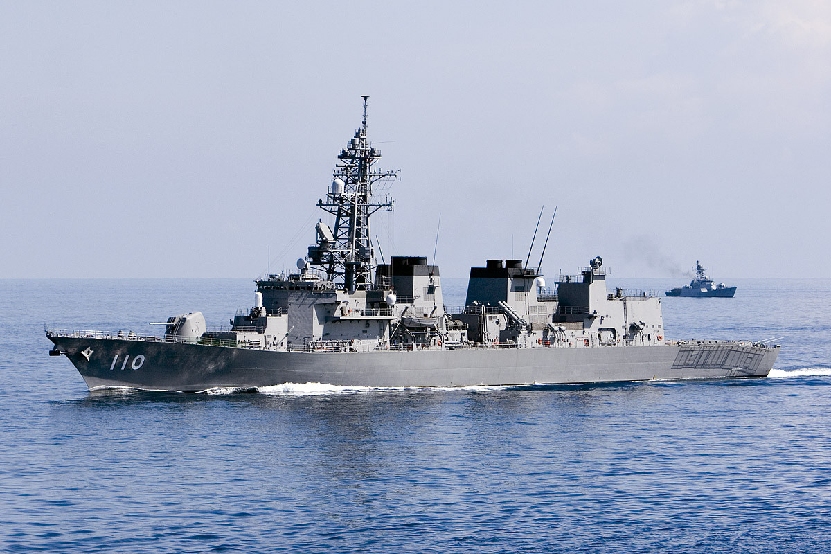 JS Takanami (DD-110) transits.